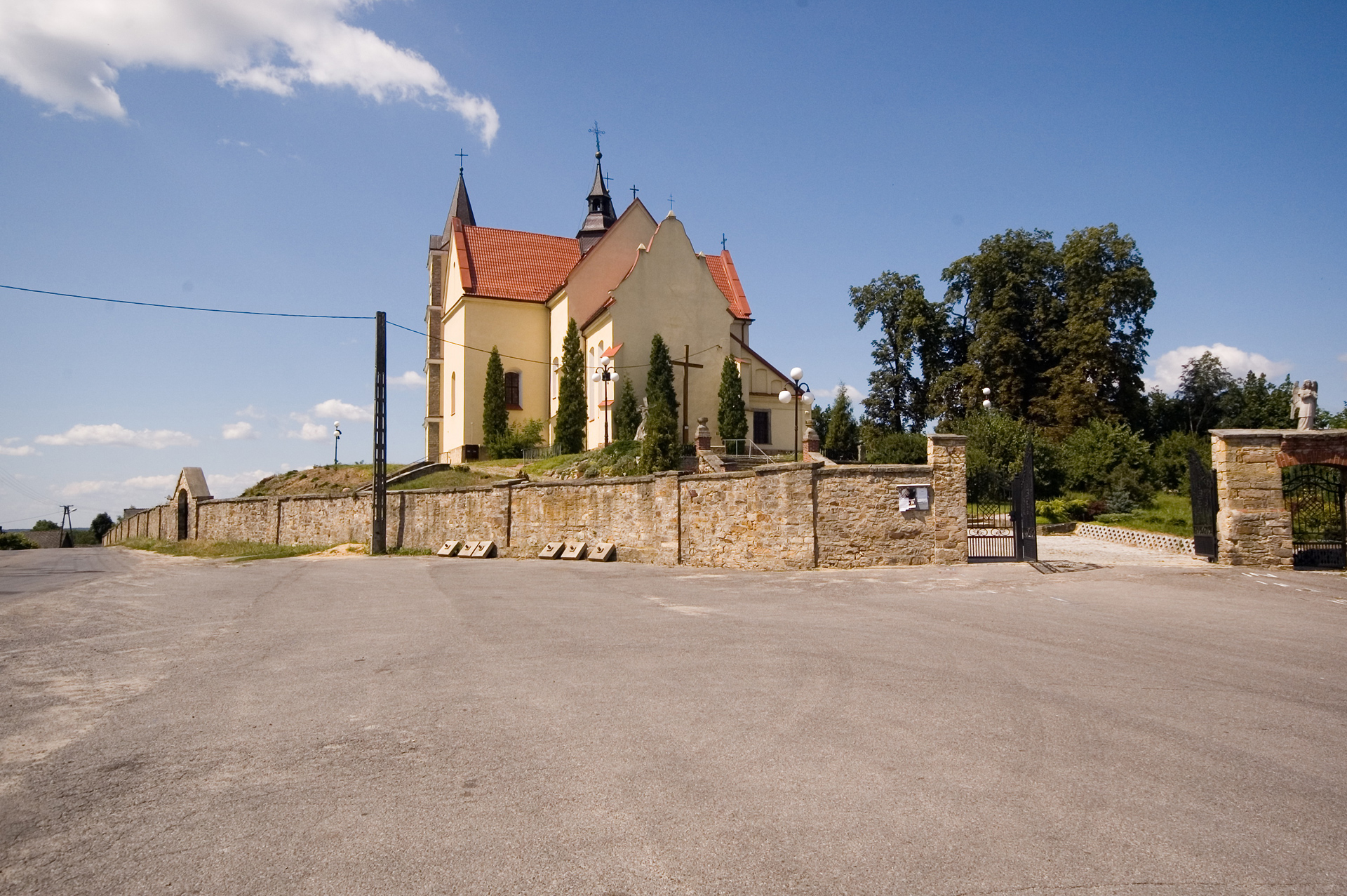 Kościół par. p.w. śś. Piotra i Pawła Gowarczów, Gowarczów 483 z 23.03.1957.